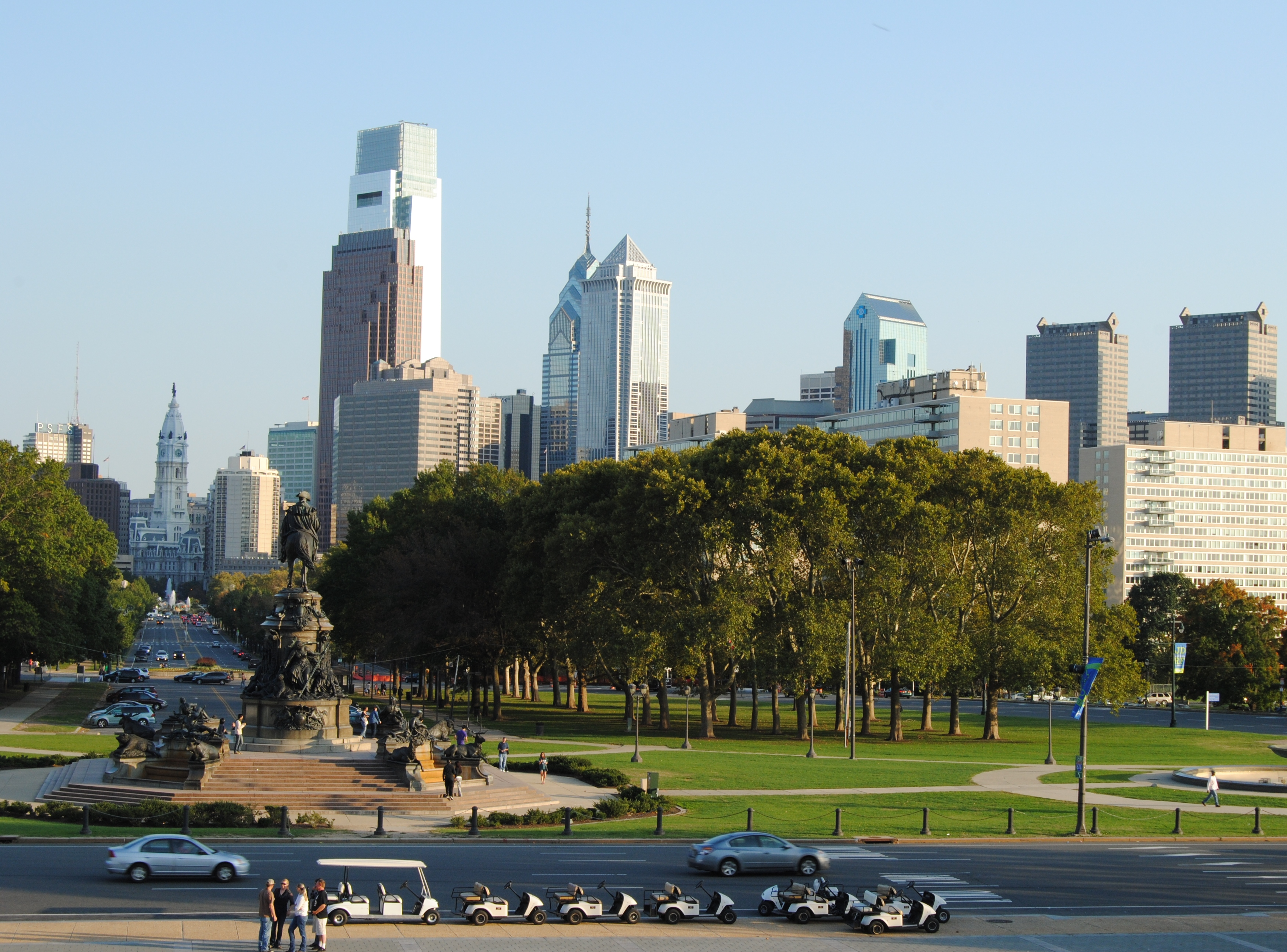 Philadelphia skyline - USA